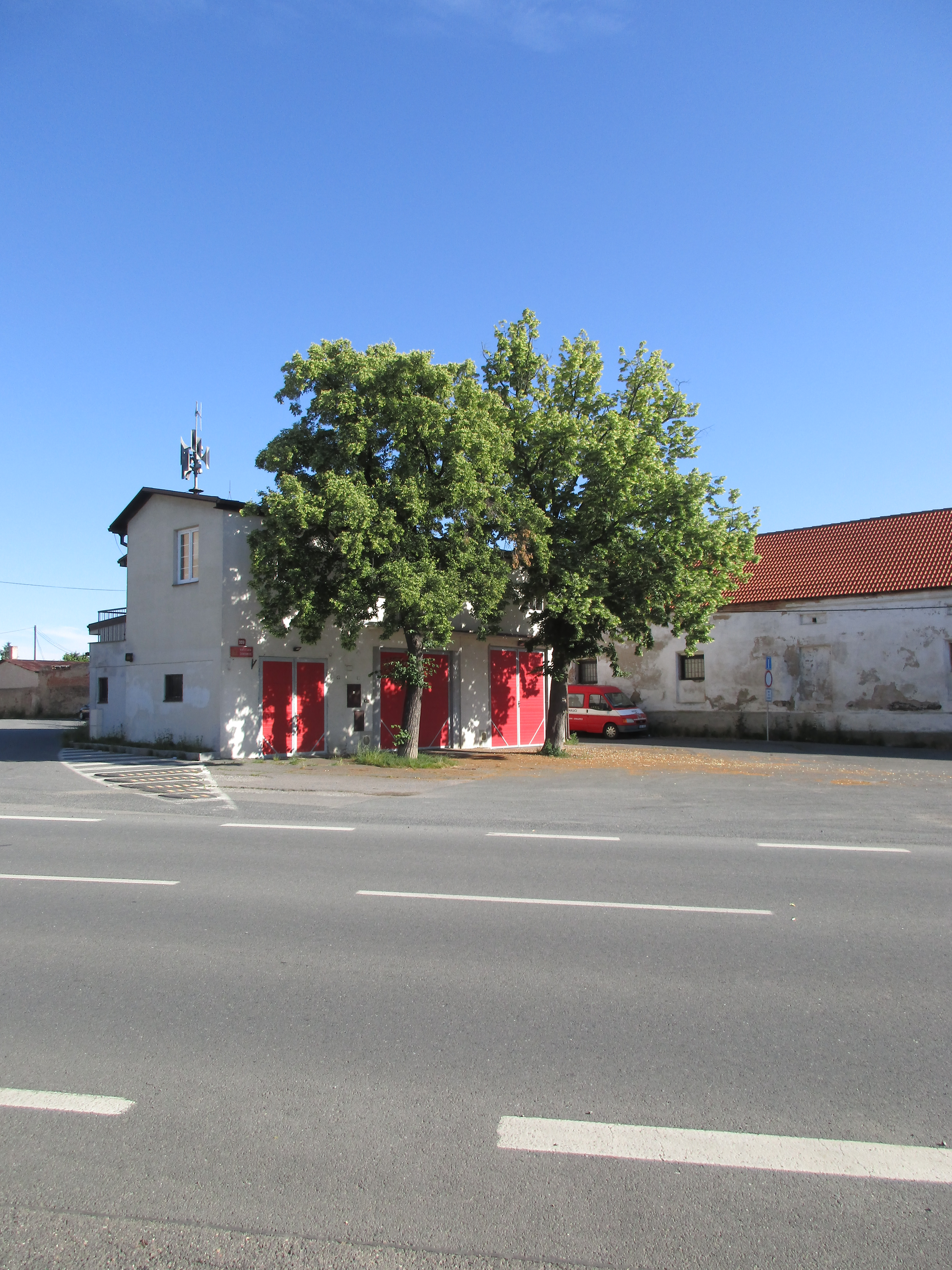 Lípa malolistá (Tilia cordata), lípa velkolistá (Tilia platyphyllos). Praha 4 - Cholupice, křižovatka ulic Podchýšská a K Dýmači. Vysazena 30. dubna 1919 na památku vzniku Československé republiky. Významné stromy, evidenční číslo MHMP: 64, v databázi od roku 2015.